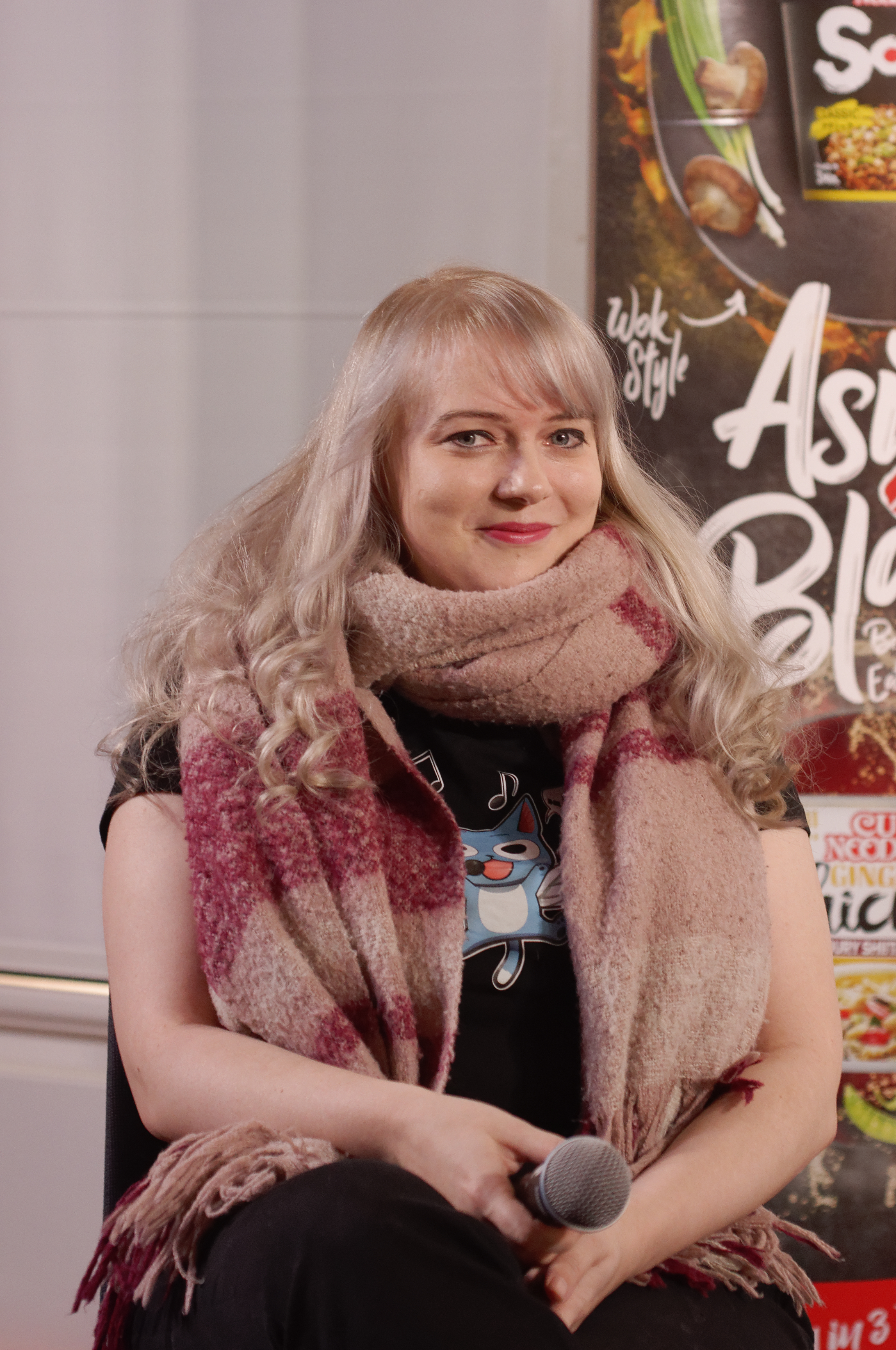 Charlotte Uhlig